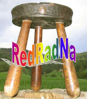 Redradna symbol